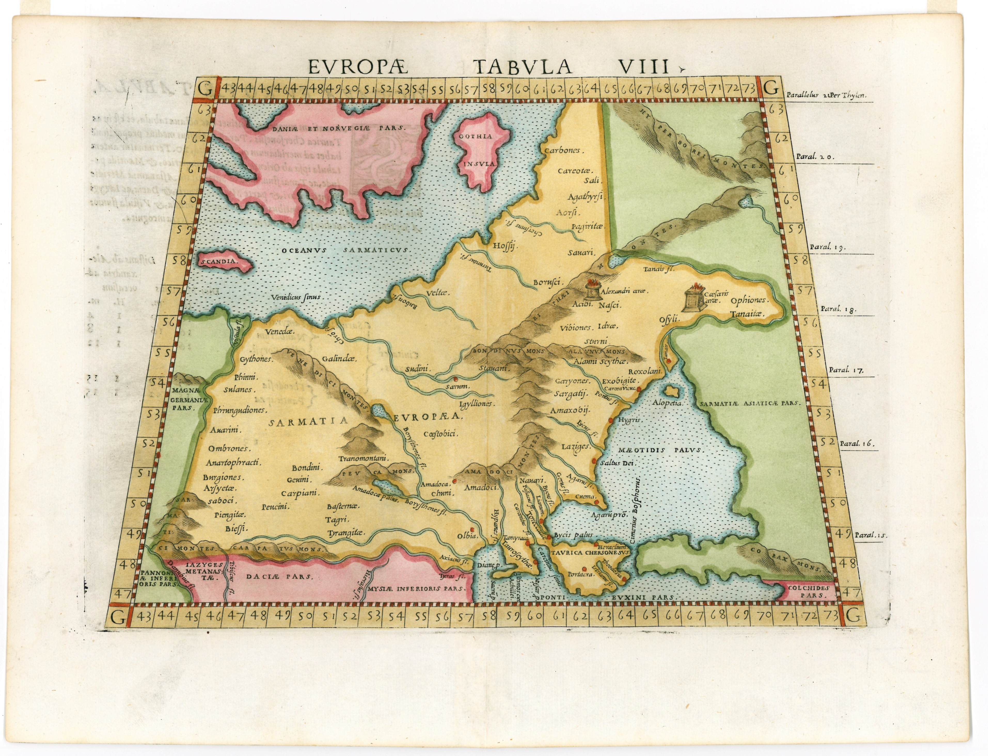 Džirolamas Rušelis (it. Girolamo Ruscelli) rekonstruotas Klaudijaus Ptolemėjaus veikalo "Geografija" Rytų Europos kartografinis vaizdas, Sarmatia Europaea - teritorija tarp Baltijos, Adrijos ir Juodosios jūros. Popierius, vario raižinys, aukštis x plotis – 23,8 x 31,2 cm.